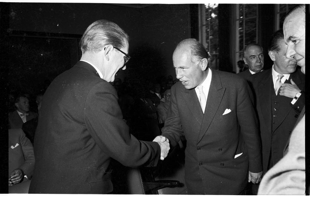 in der Industrie- und Handelskammer (IHK) am Lorentzendamm 24. Im Bild Ministerpräsident Kai Uwe von Hassel (links) begrüßt den schwedischen Handelsminister Gunnar Lange (Bildmitte). Im Hintergrund Oberbürgermeister Dr. Müthling (rechts).